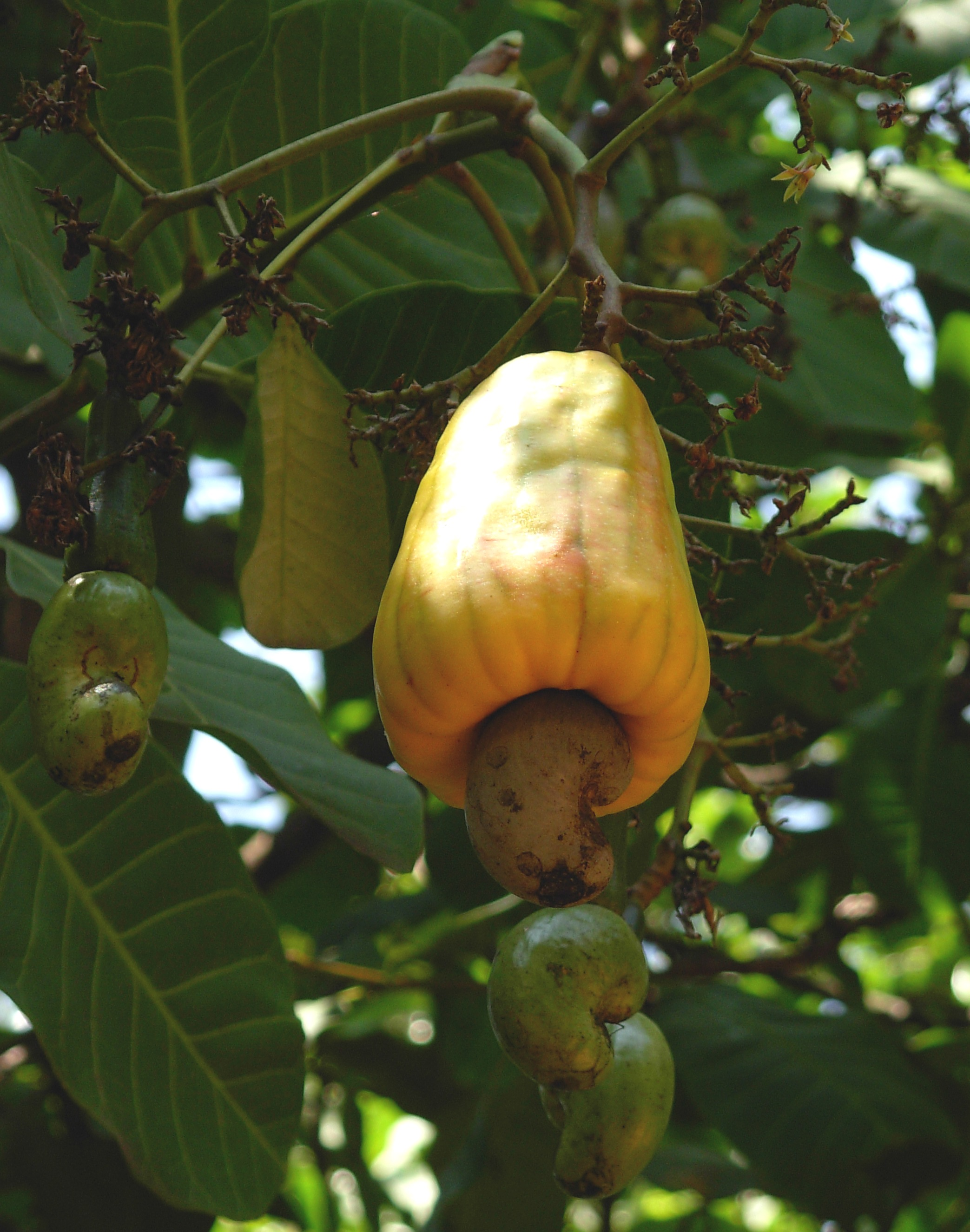 പറങ്കിപ്പഴം